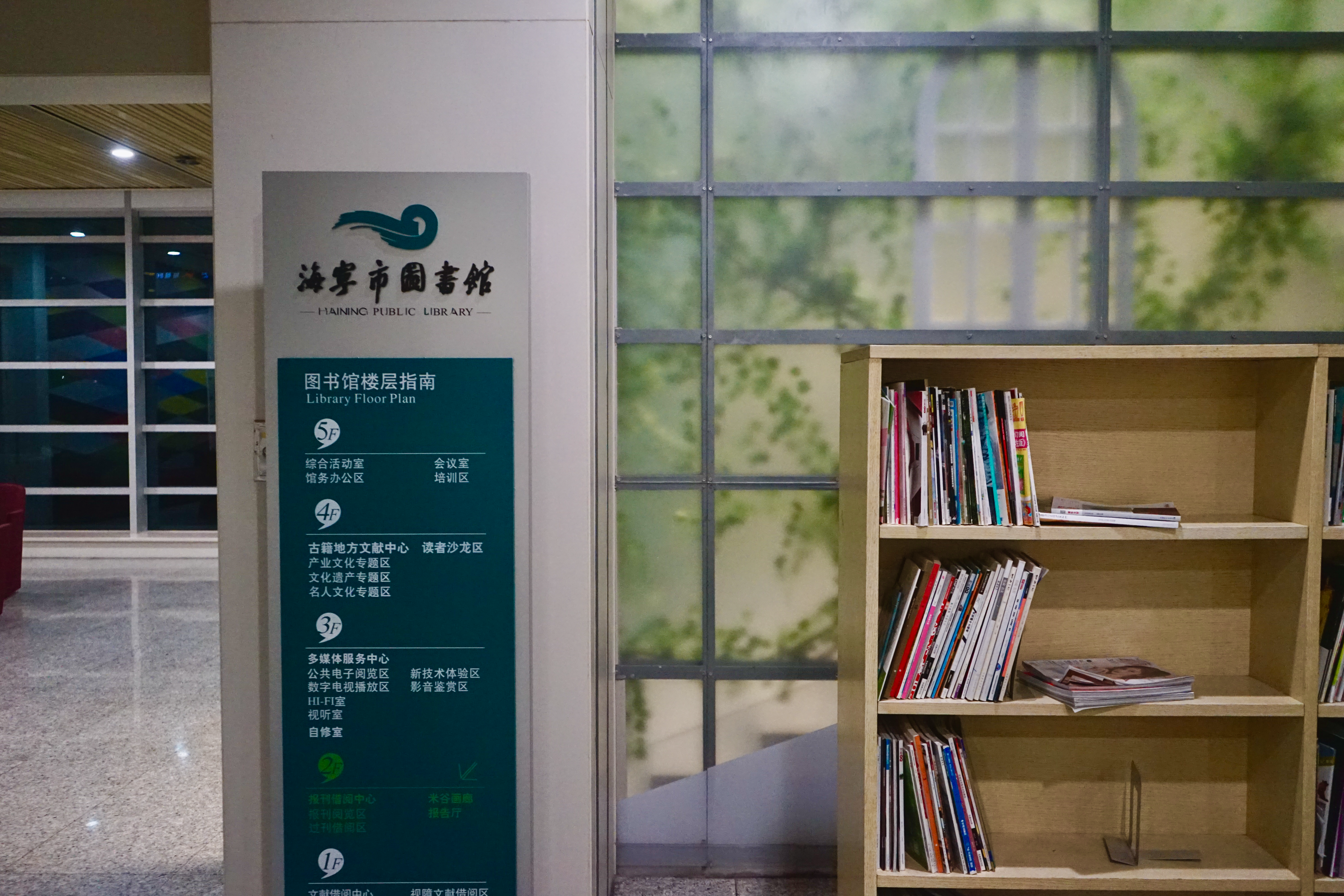 中文（中国大陆）: 海宁图书馆